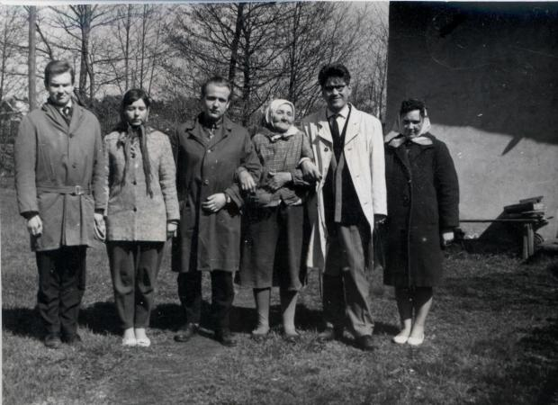 Liivi sõit 19.-21.05.1965. Pildilolijad Jaak Simm, Enel Aunma, Mati Hint, Toom Õunapuu, Valve-Liivi Kingisepp.